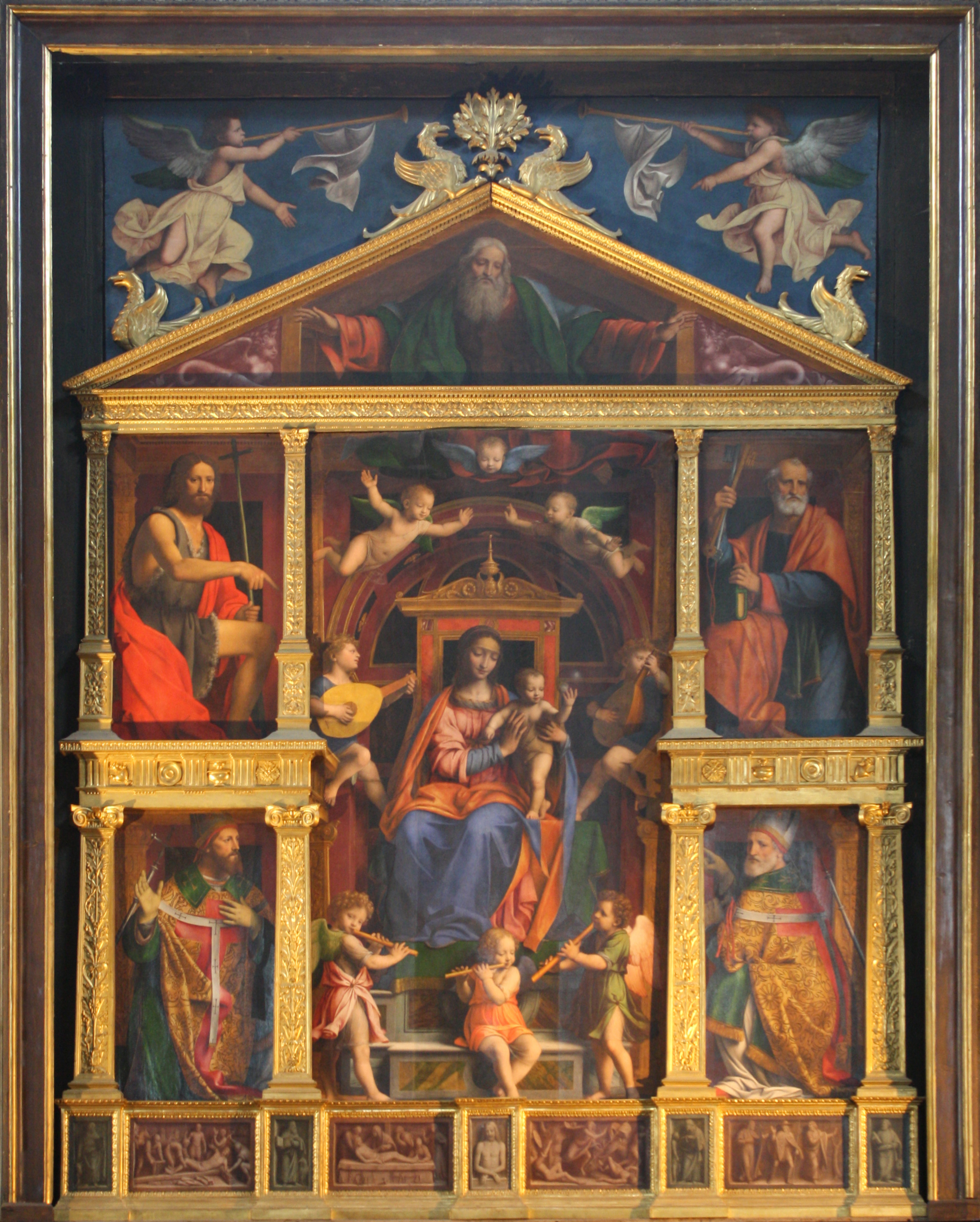 L'interno della basilica di San Magno a Legnano - Cappella principale - Polittico di Bernardino Luini del 1523 raffigurante la Madonna col Bambino, sette angeli musicanti ed alcuni santi